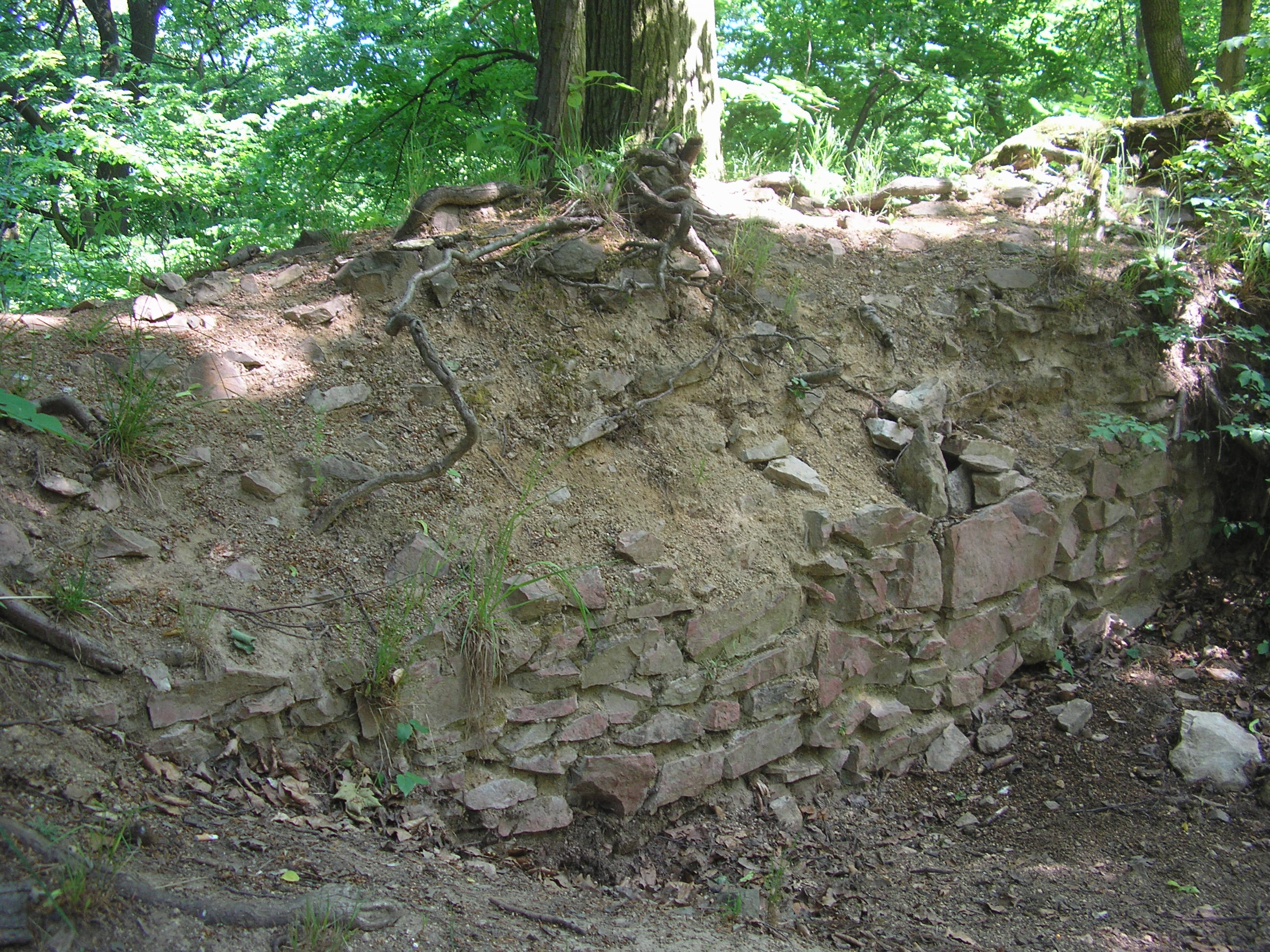 Ronov u Adamova